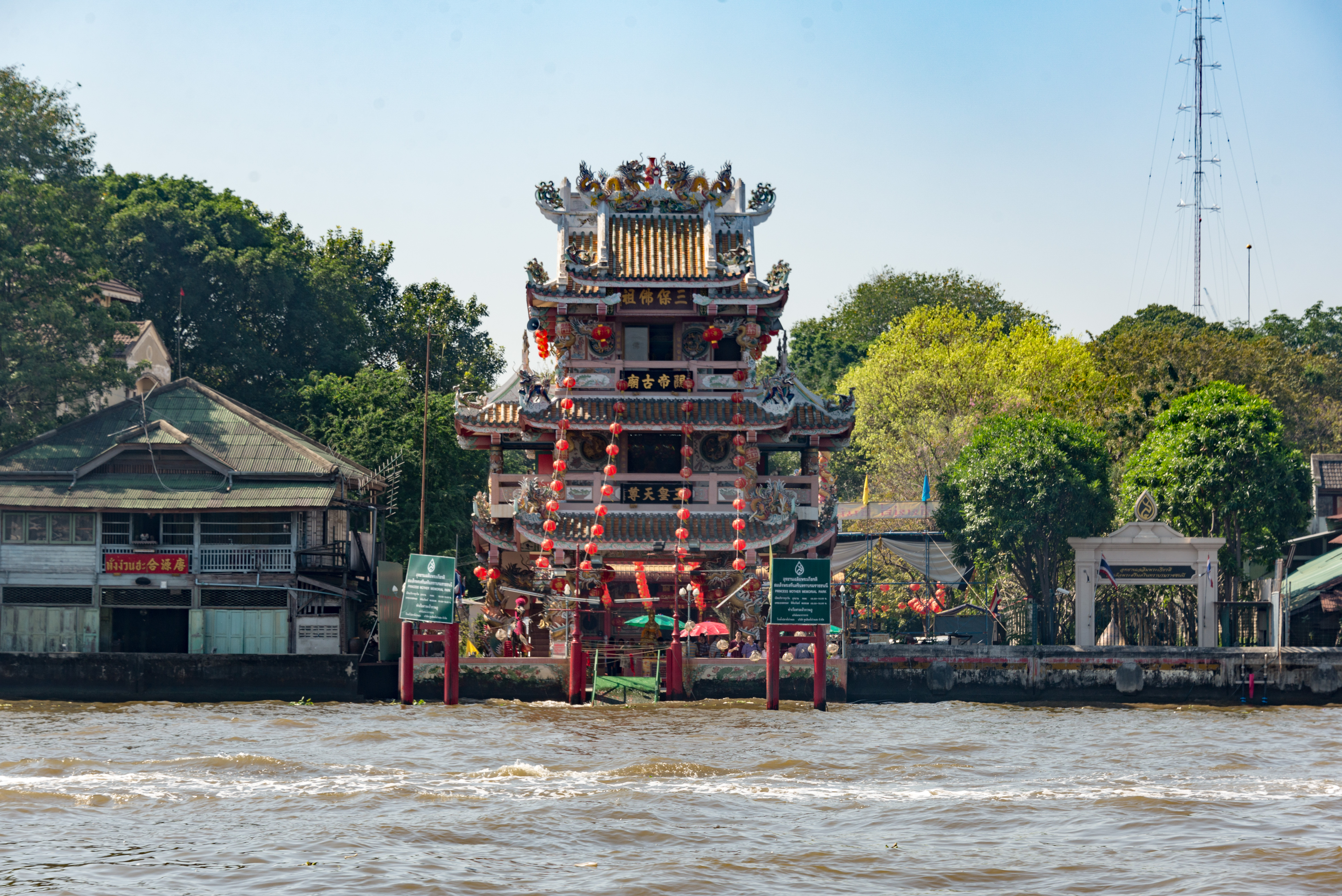 Gong Wu (Guan Yu) Shrine, Khlong San